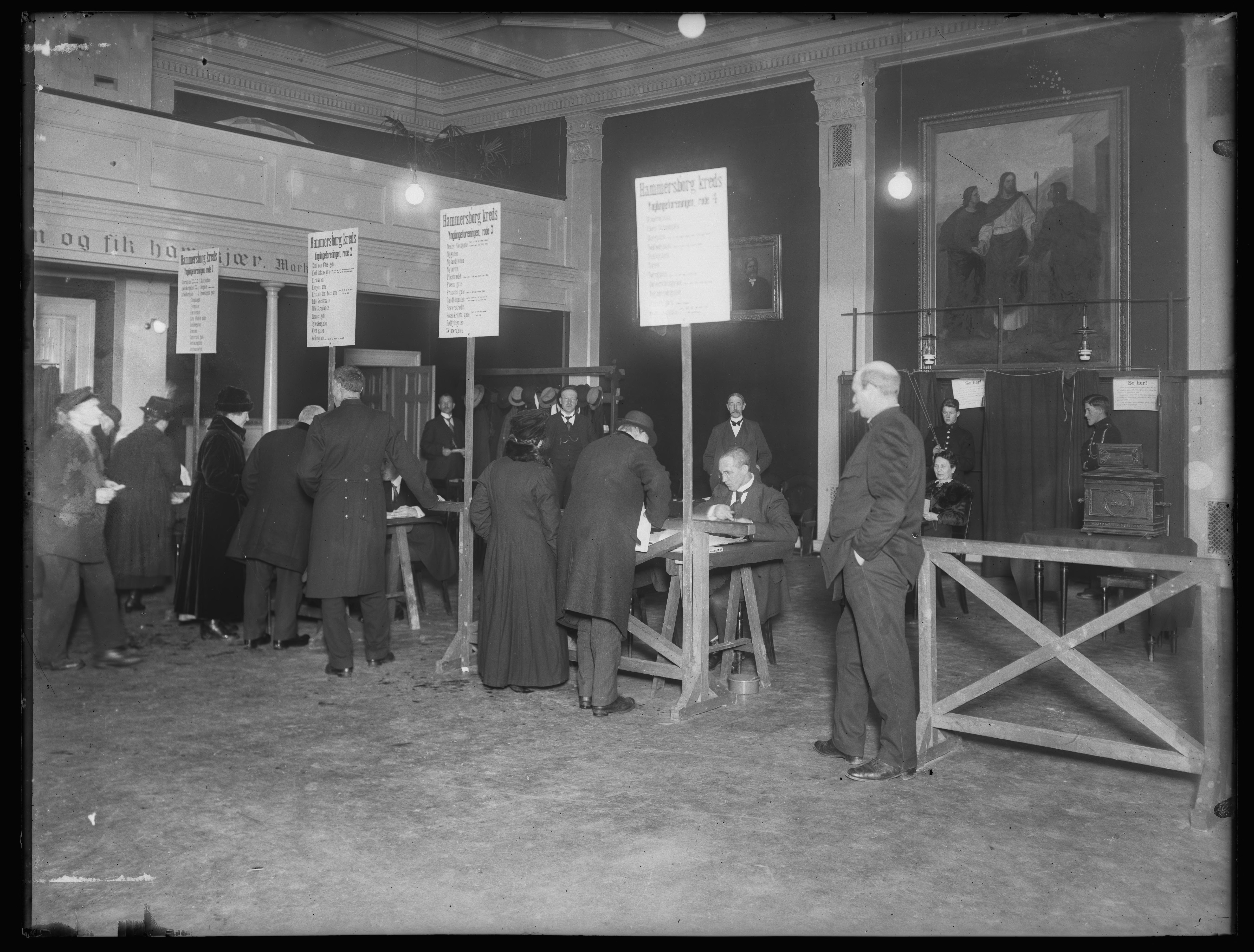 Bildet er hentet fra Nasjonalbibliotekets bildesamling Hammersborg, Oslo, Oslo